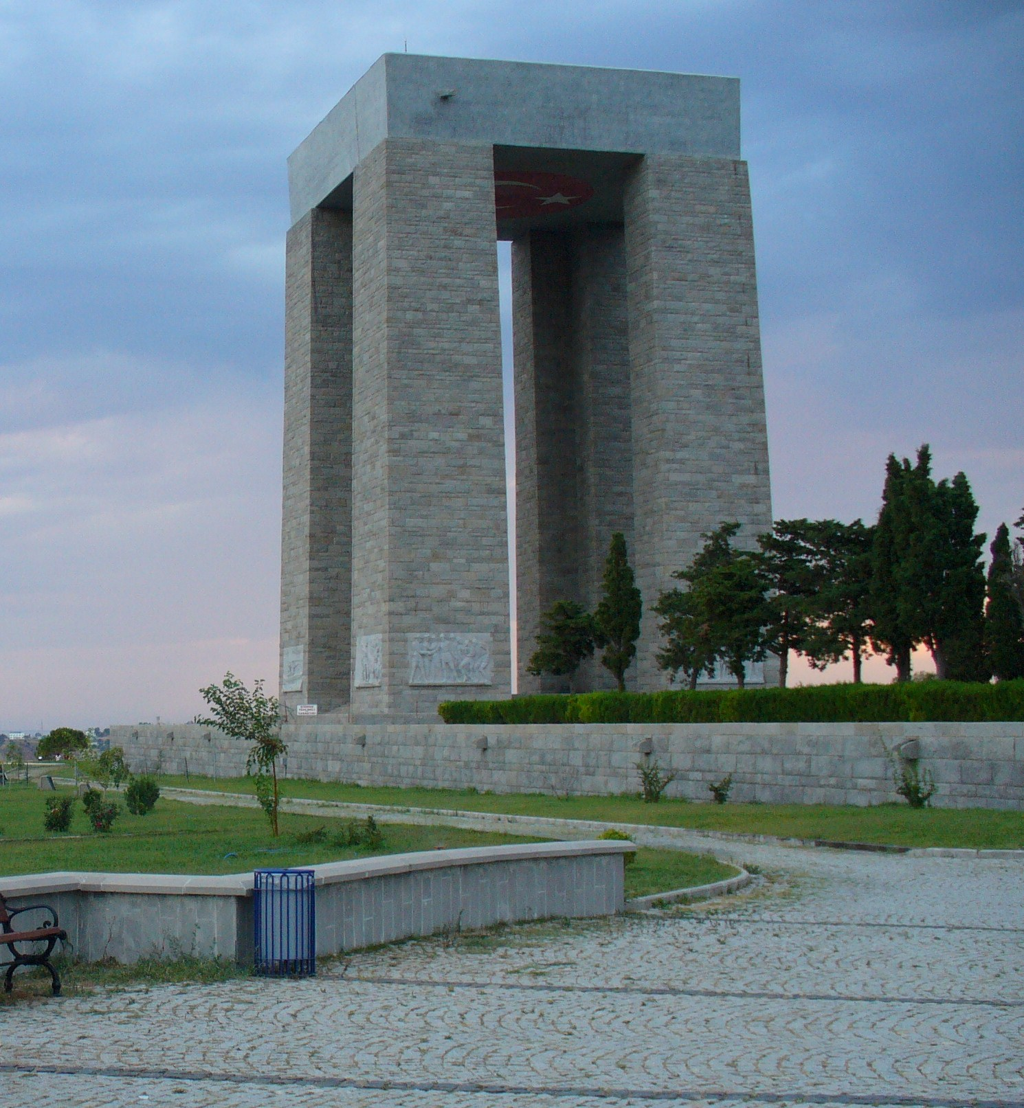 martyrdom monument *©Abdullah Kiyga